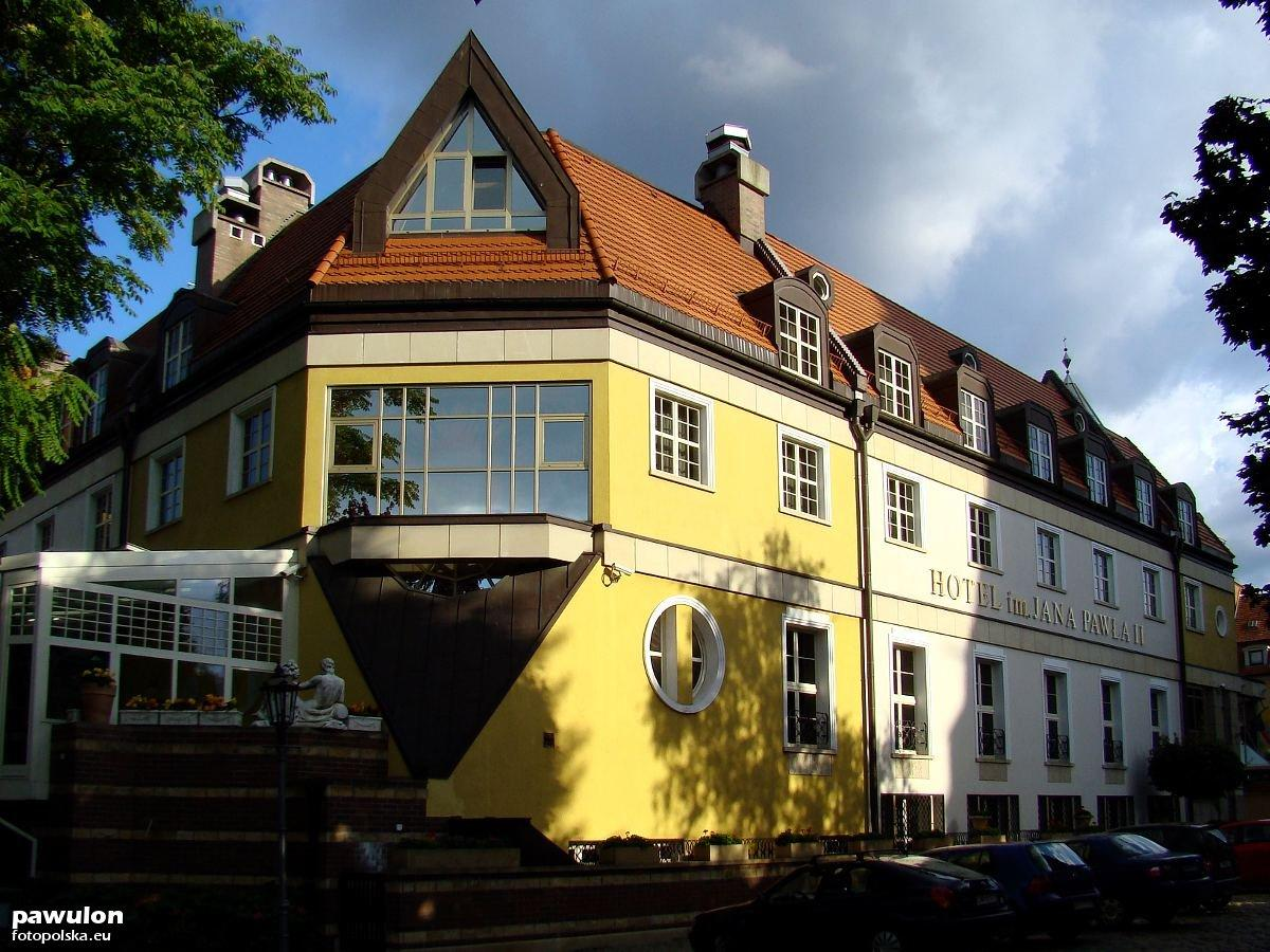 Hotel Dom Jana Pawła II.